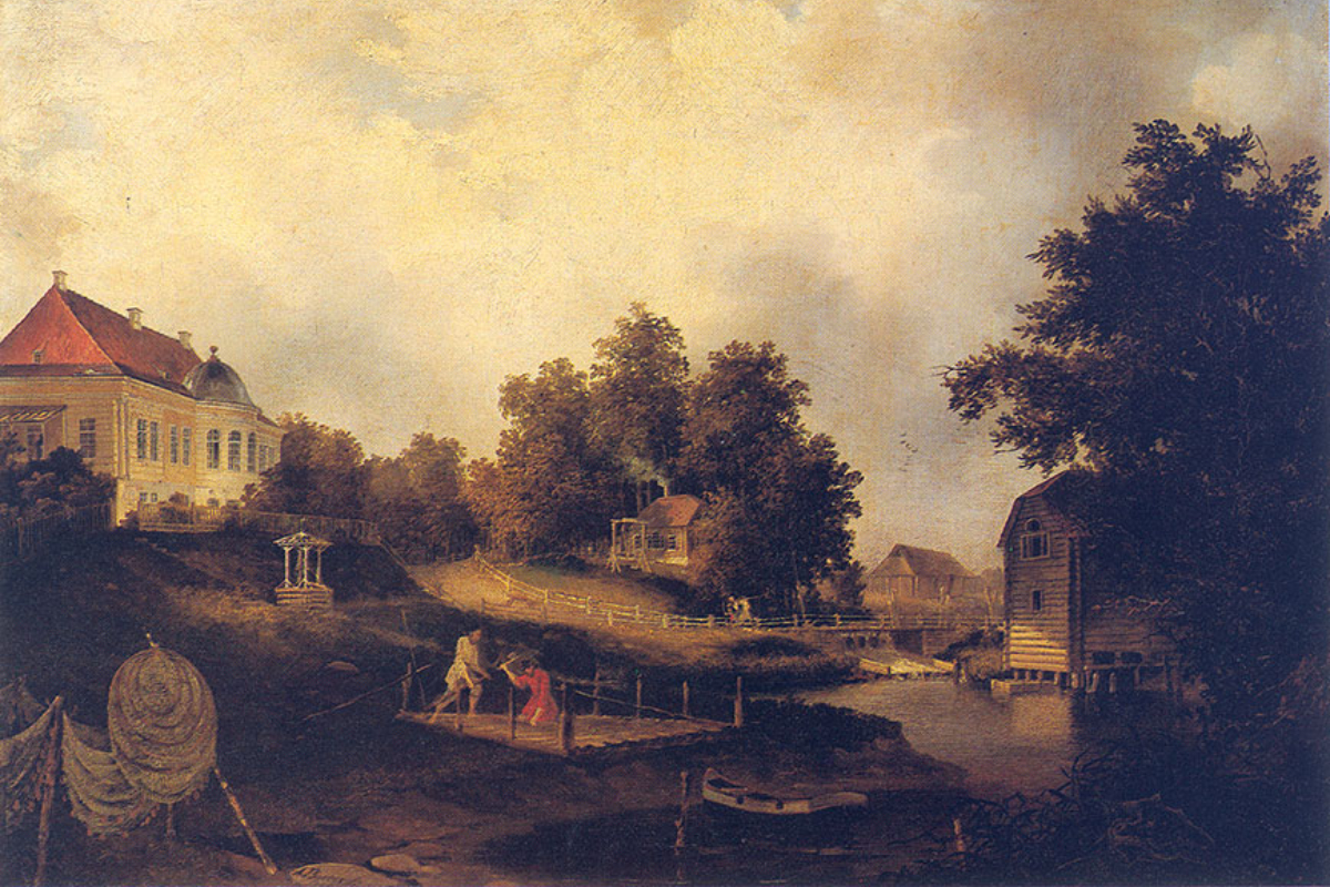 «Вид в усадьбе М. Д. Резвого Мариенгоф близ Петербурга» — 1846 год. Холст, масло, 40 х 58 см. Хранится в Третьяковской галереи